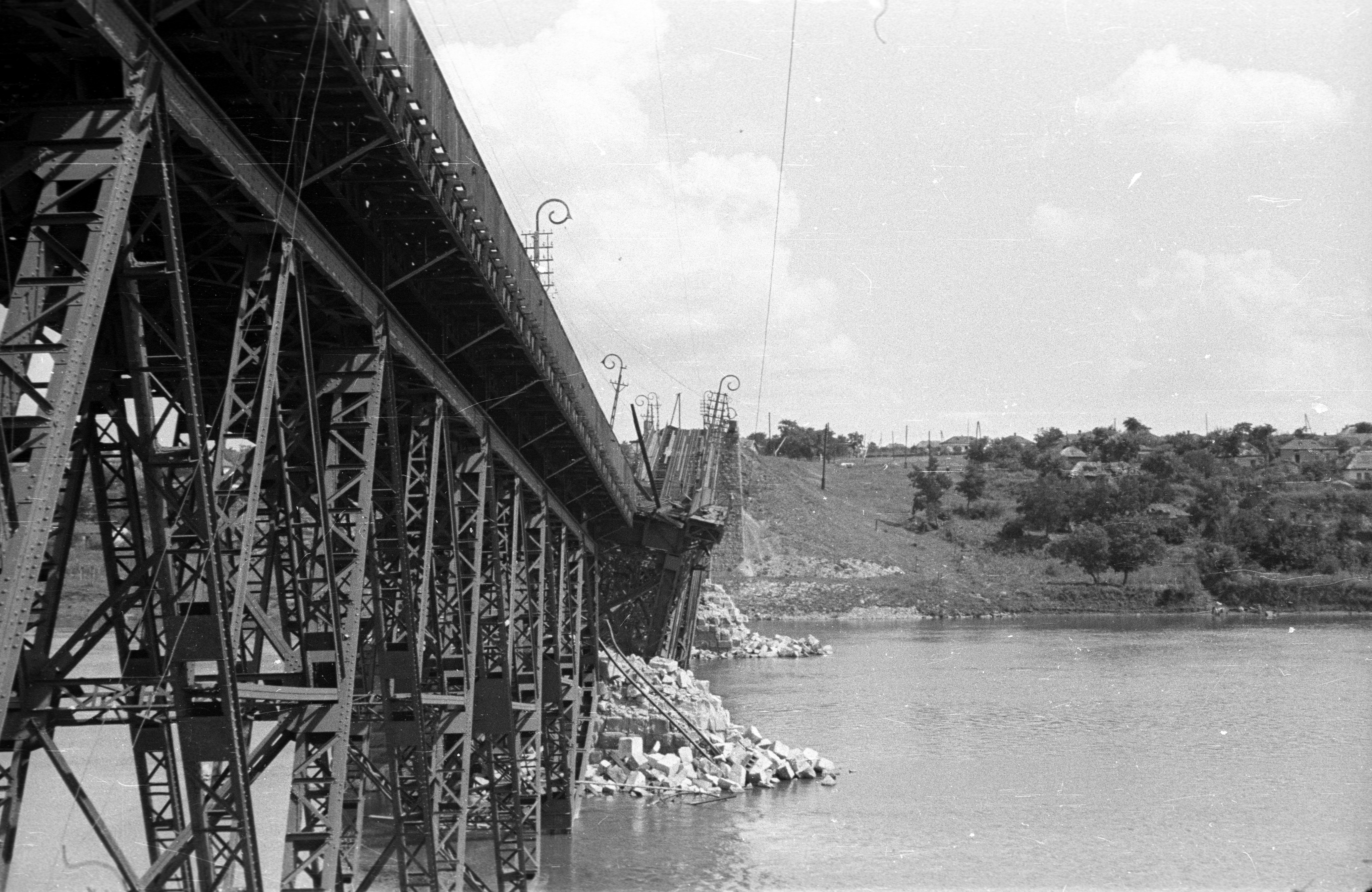 a lerombolt vasúti híd a Bug folyón. Location: Ukraine, Pervomajsk Tags: wrecked bridge, river Title: a lerombolt vasúti híd a Bug folyón.